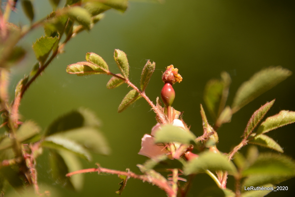 Rosa x aveyronensys